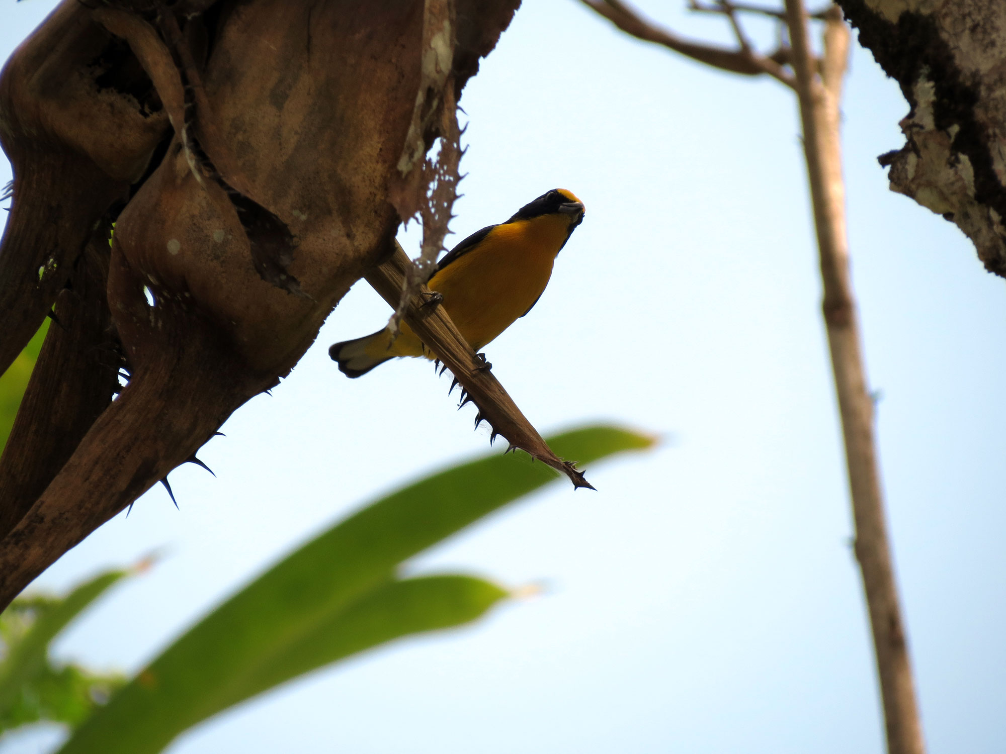 Euphonia laniirostris. Gamboa, Colón, Panamá